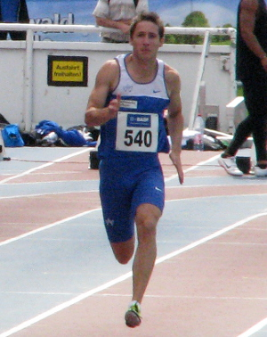 Christian Blum beim DLV WM-Testwettkampf 2011 im Stadion der MTG Mannheim.